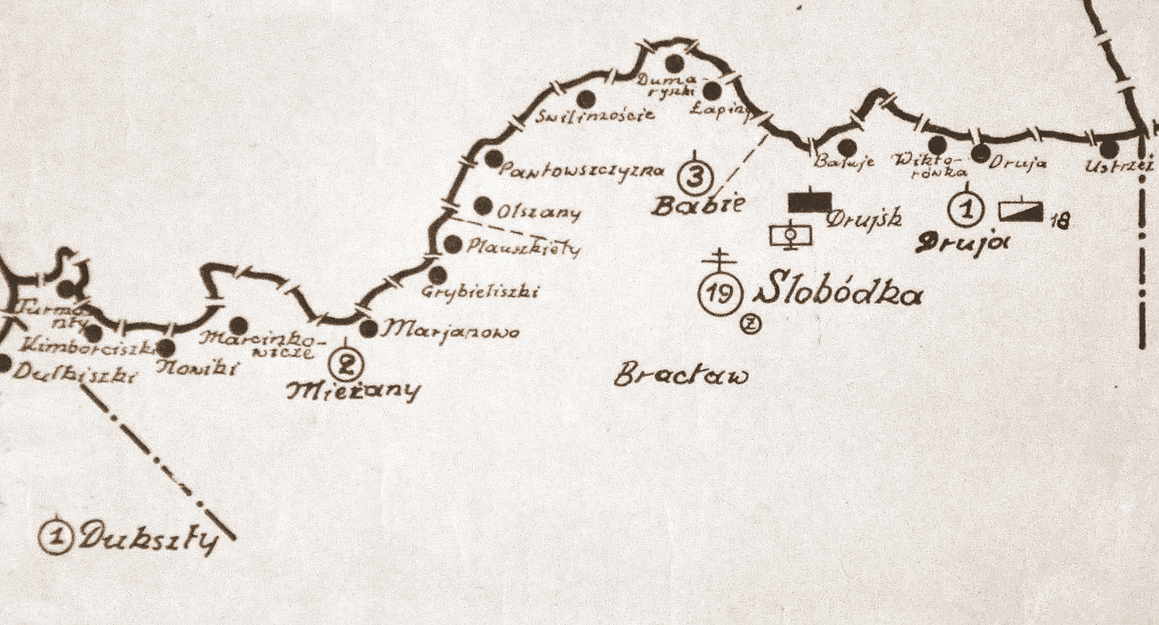 Szkic rozmieszczenia batalionu KOP Słobódka w 1931